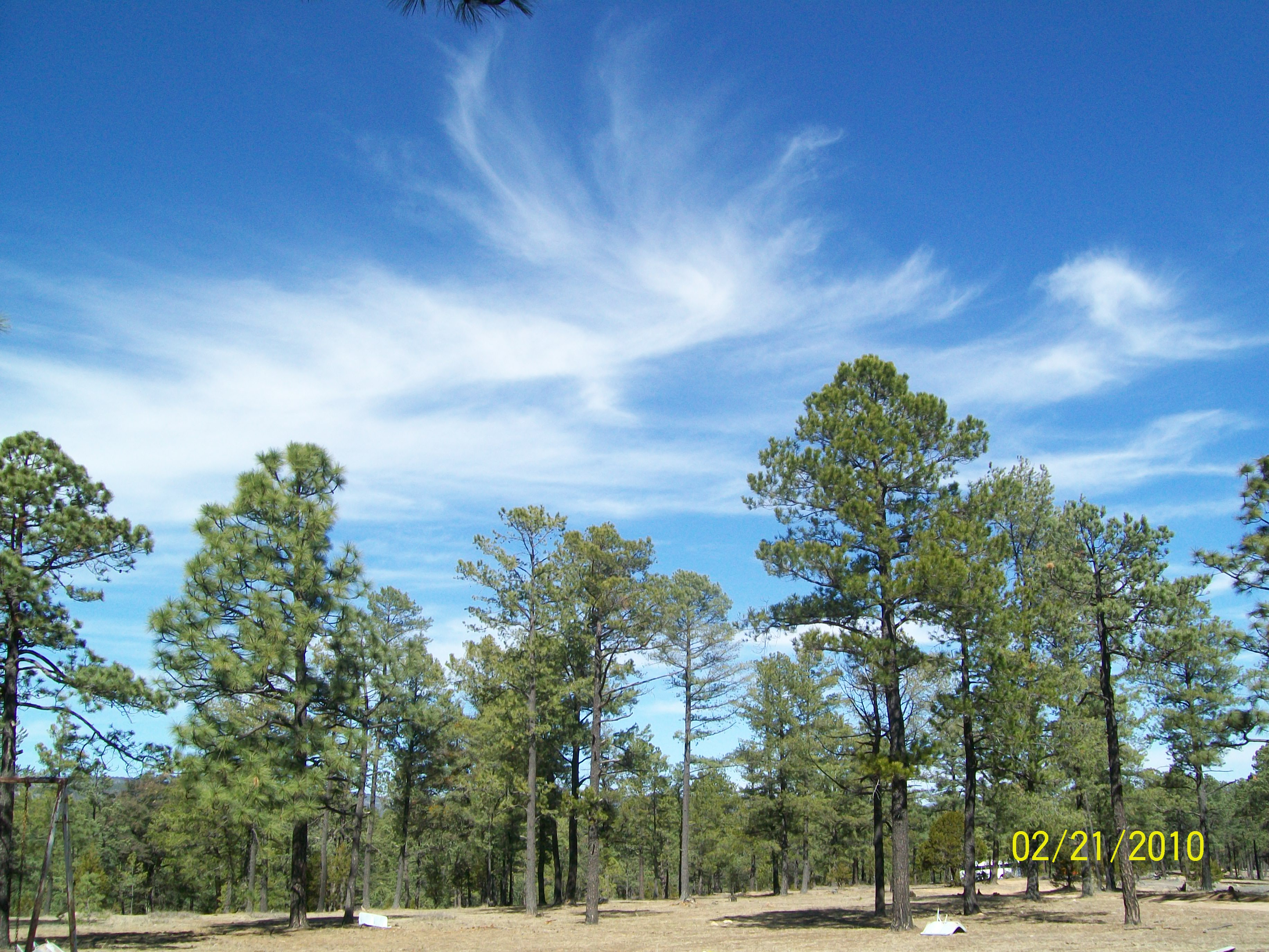 Bosque de pinos en Durango México